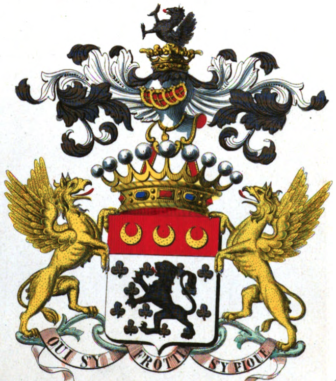 Armoiries de la famille de Giey